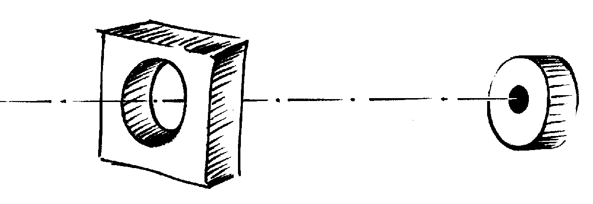 Cibles « Barbacane-Sarbacana ». Ainsi la flèche de la sarbacane va devoir traverser le vide de la première cible pour atteindre le plein de la seconde. La visée devant être bonne à 10 mètres, mais aussi à 12 mètres. La trajectoire devant passer par deux points placés sur la même horizontale, ceci va mettre en évidence la droiture du jet de flèche, résultant de la puissance du souffle la V.E.M.S. ( V olume E xpiratoire M aximum par S econde)